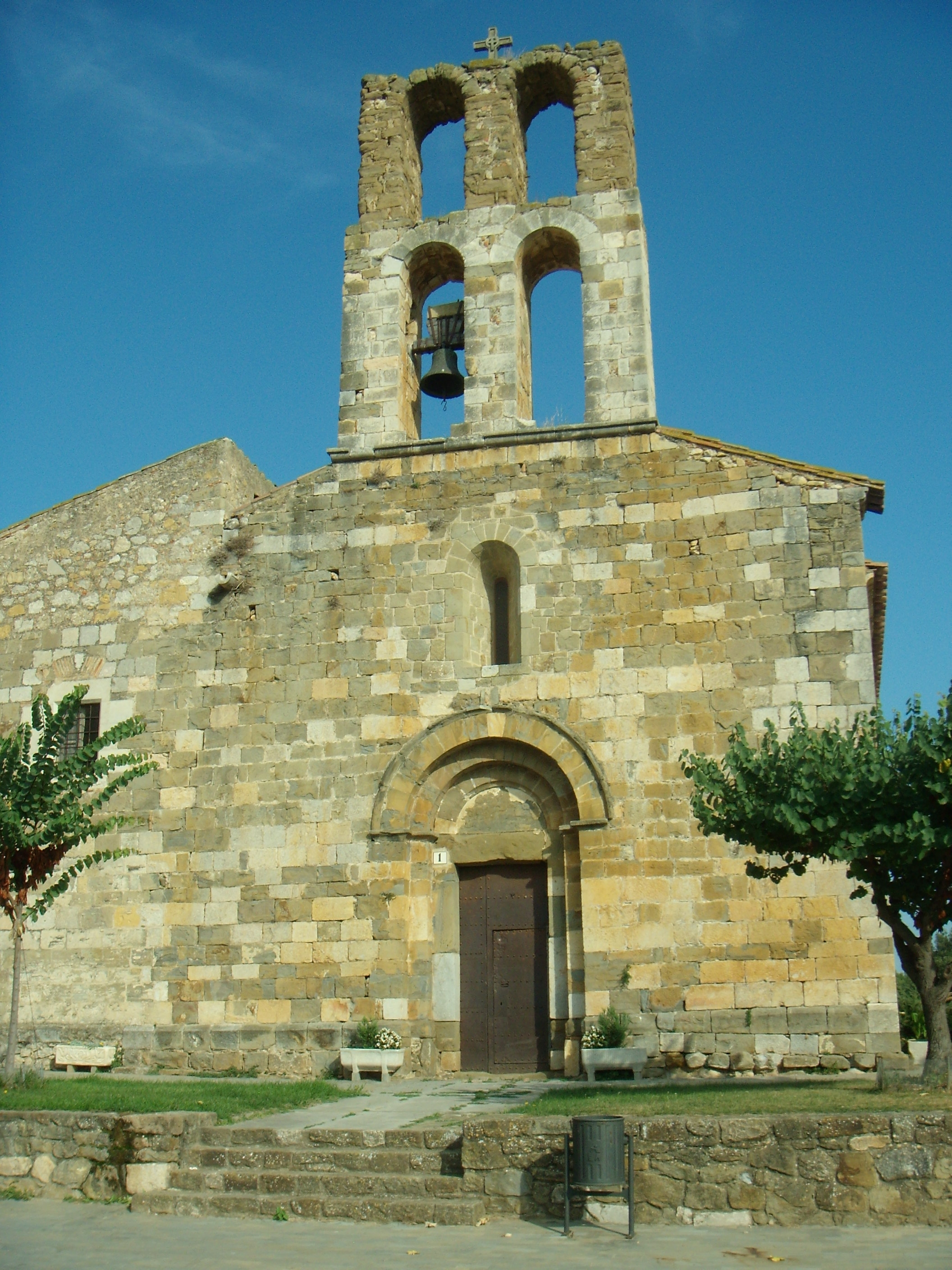 Esglèsia de Garrogoles